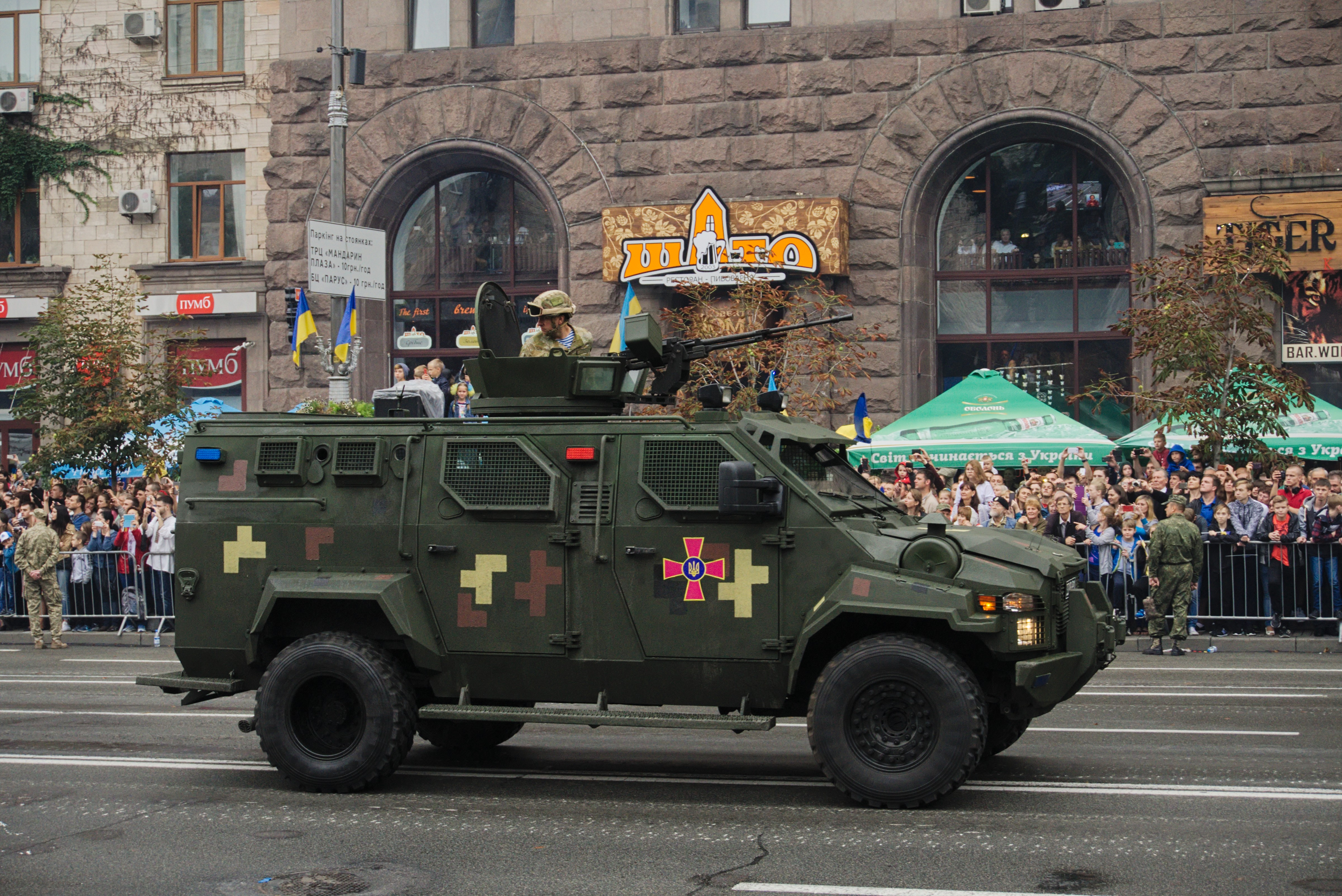 Бронеавтомобиль КрАЗ Спартан (Streit Group Spartan). / LAV KrAZ Spartan (Streit Group Spartan)